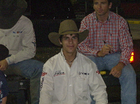 Mike Lee